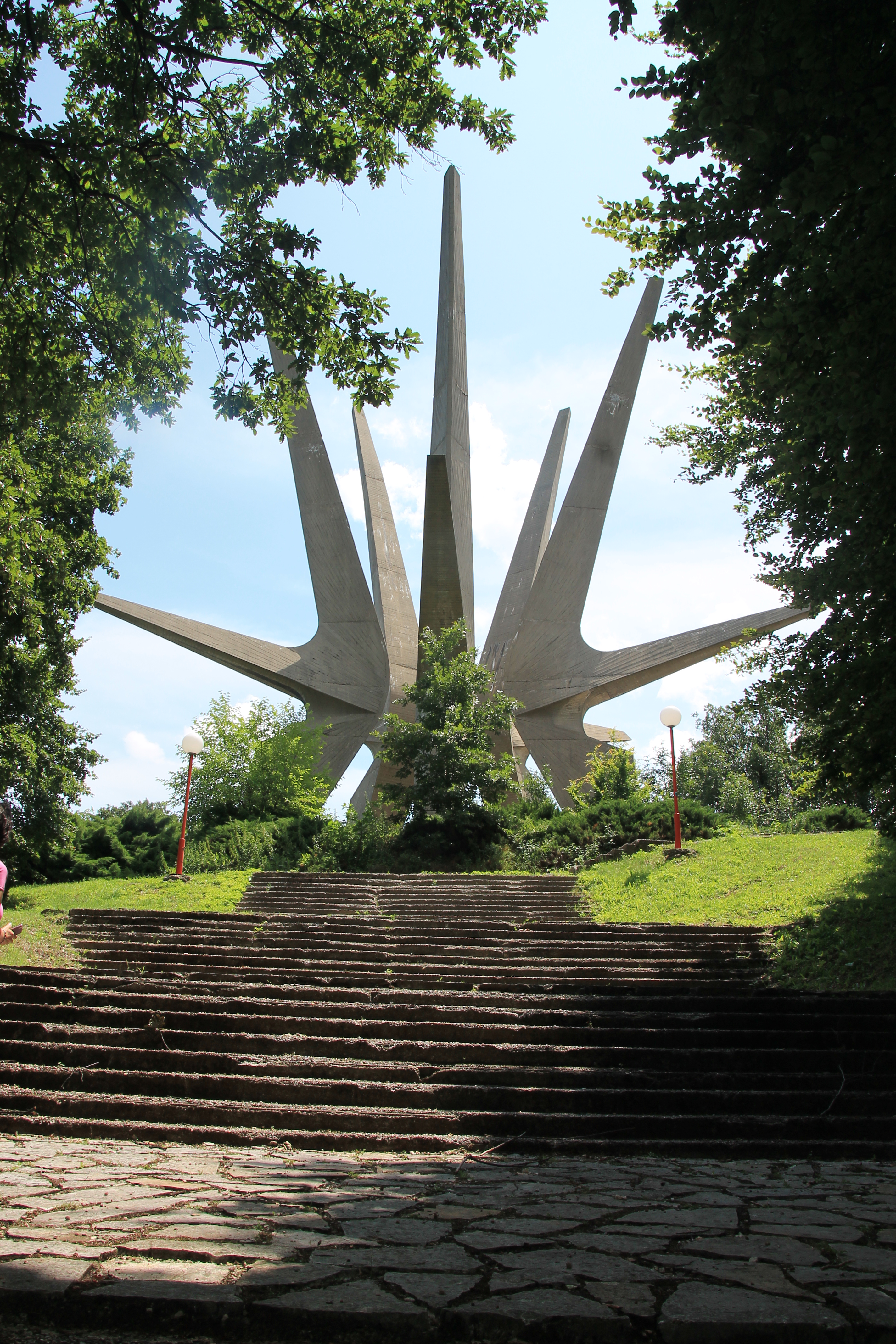 Spomenik borcima Kosmajskog odreda na vrhu Kosmaja